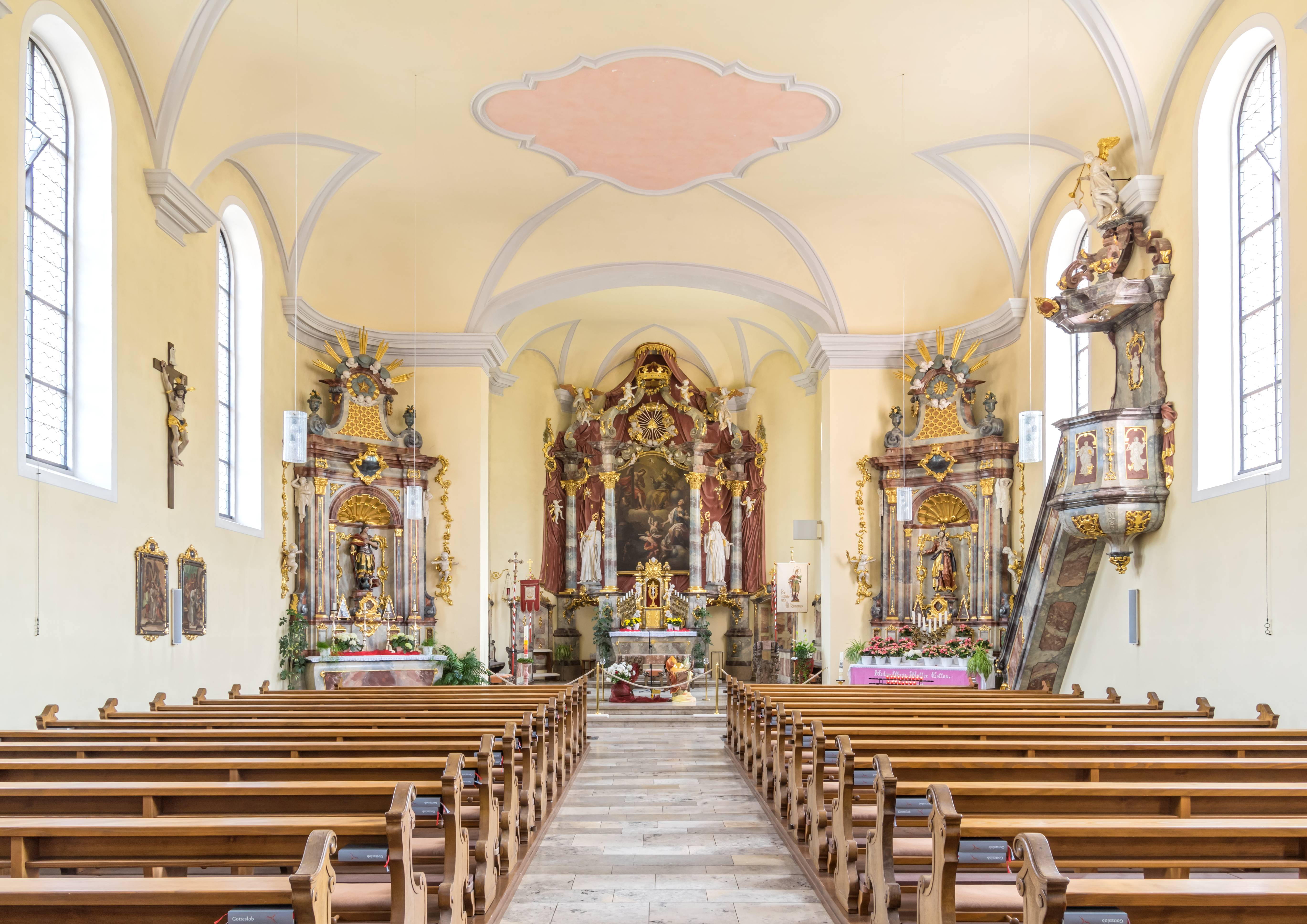 Bilder von der Kirche St. Romanus in Schweighausen Blick zum Altar